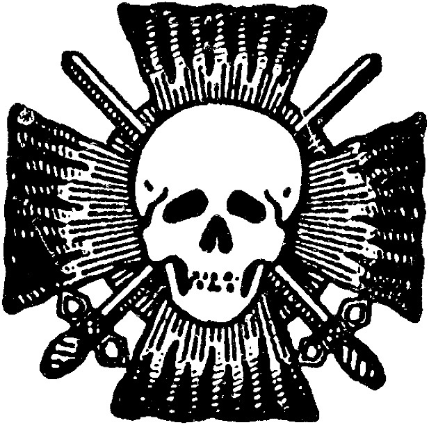 Symbole du mouvement Croix-de-Feu.